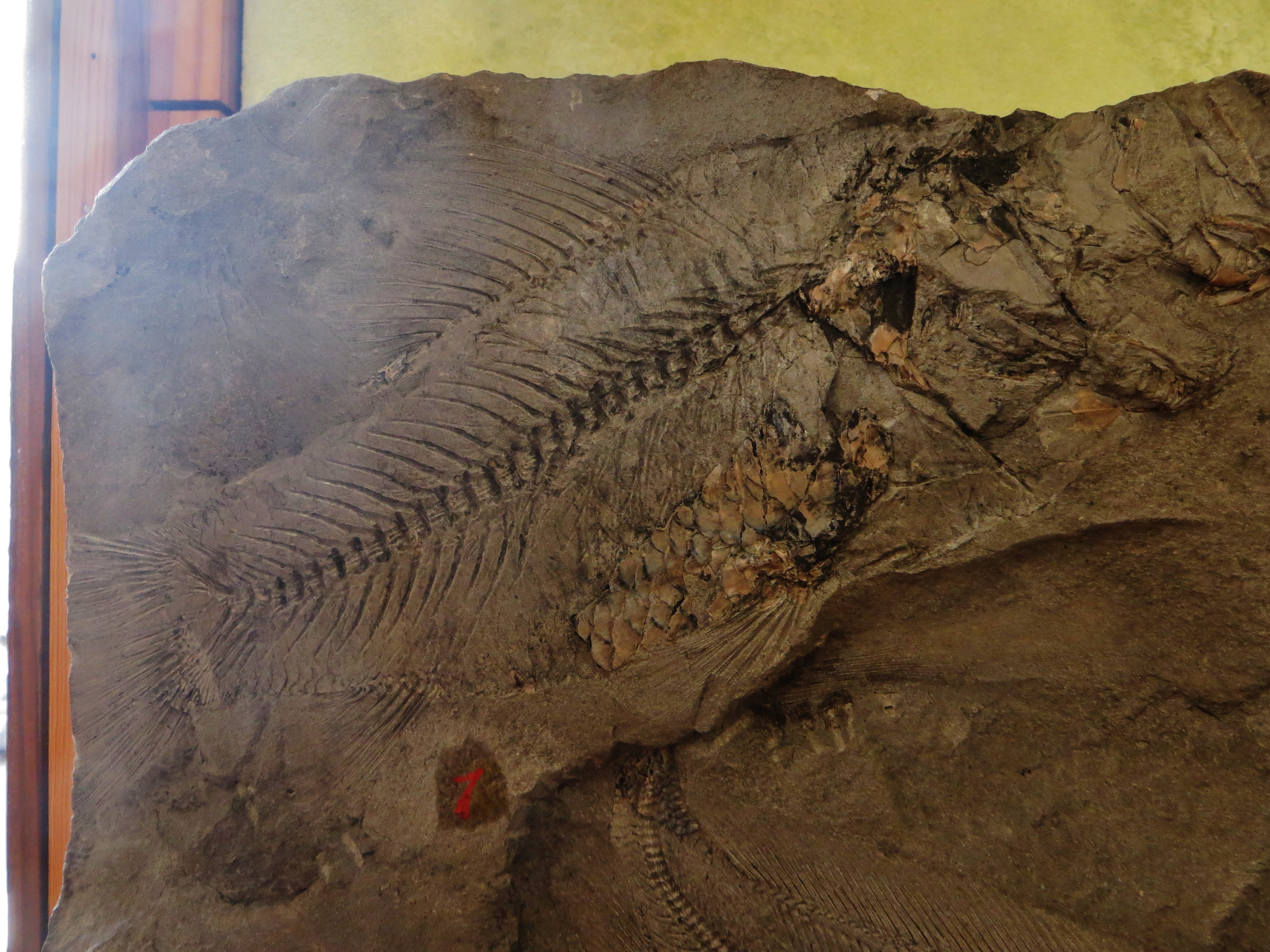 Fossil of Sardinioides - Took the picture at Natural History Museum, Bonn University